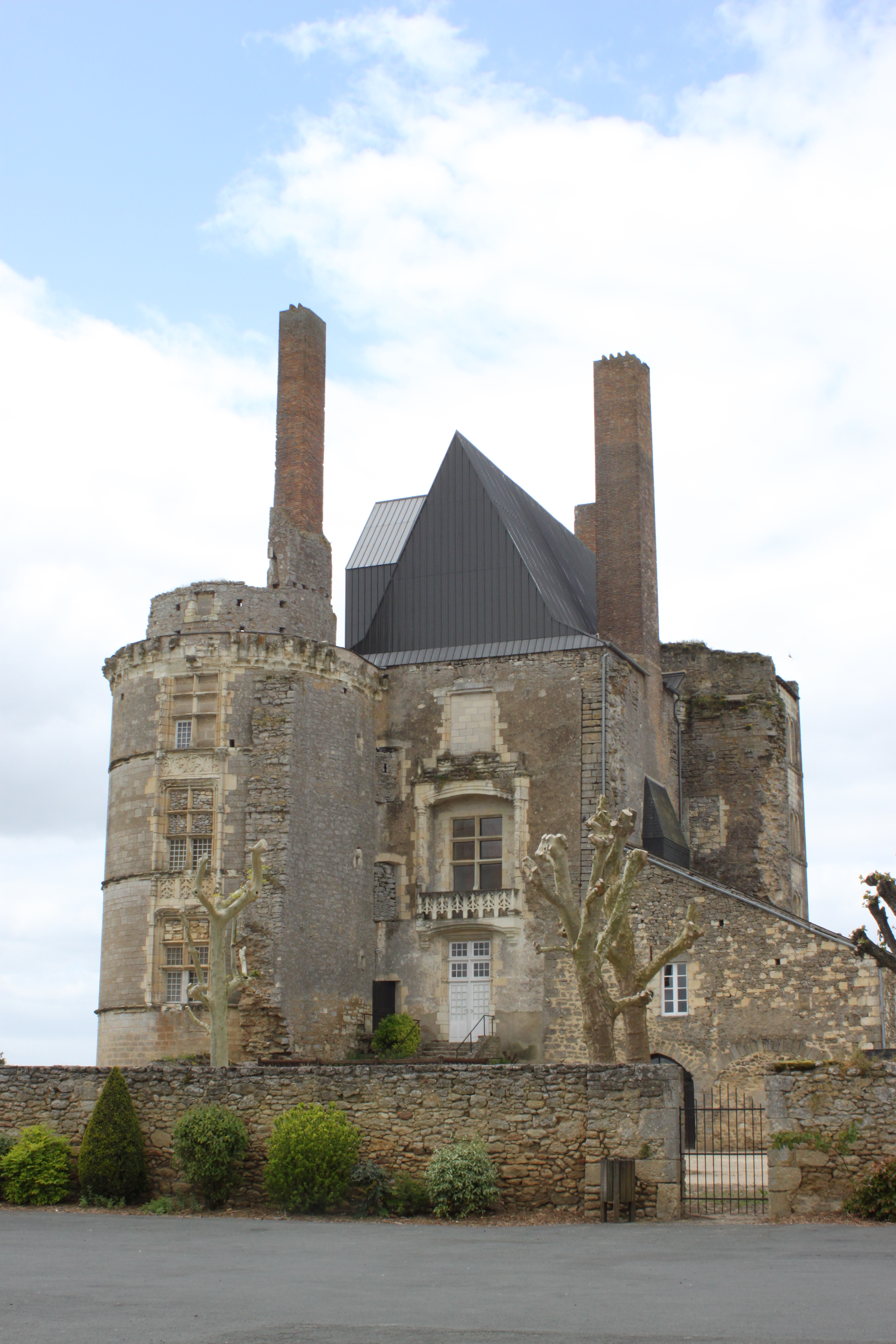 Château, Fr-49-Martigné-Briand.